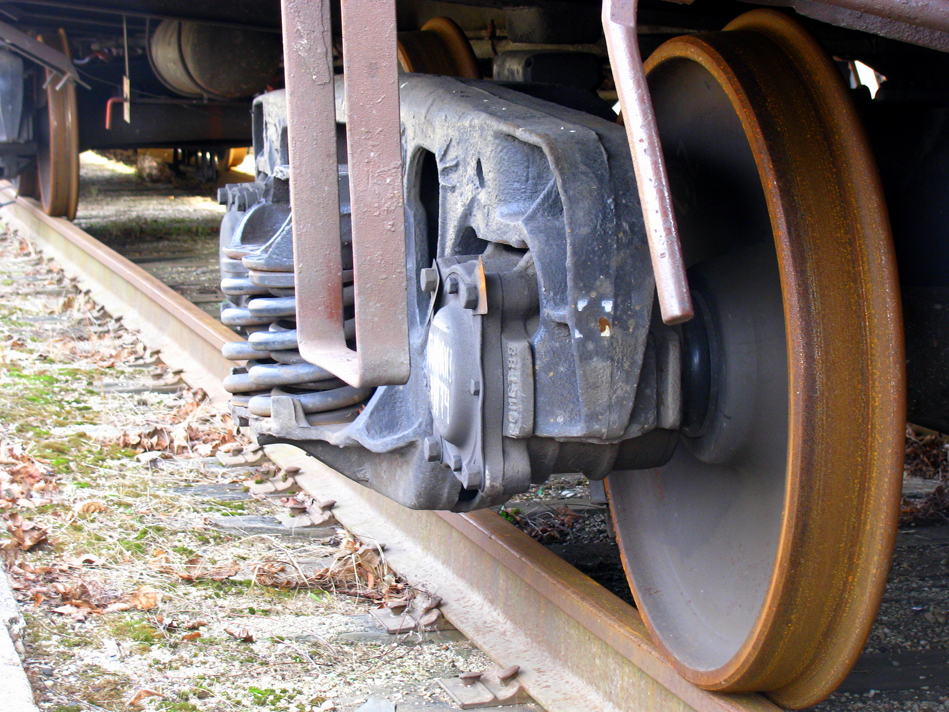 Aprūsējušās sliedes un riteņi Reņģes dzelzceļa stacijā. Rusty reels and wheels at Reņģe station. March, 2015